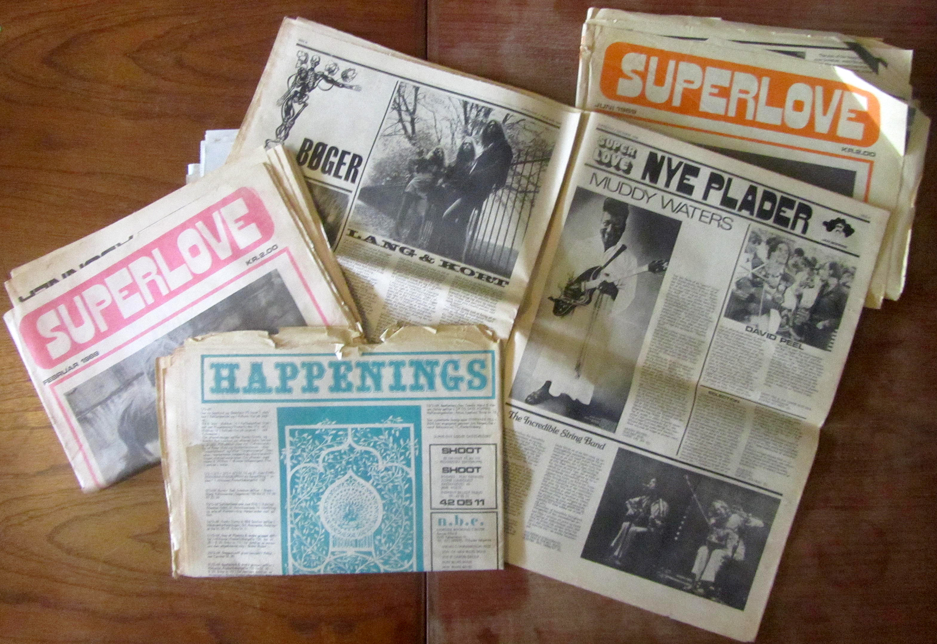 Eksempler på opslag i bladet Superlove 1968-69